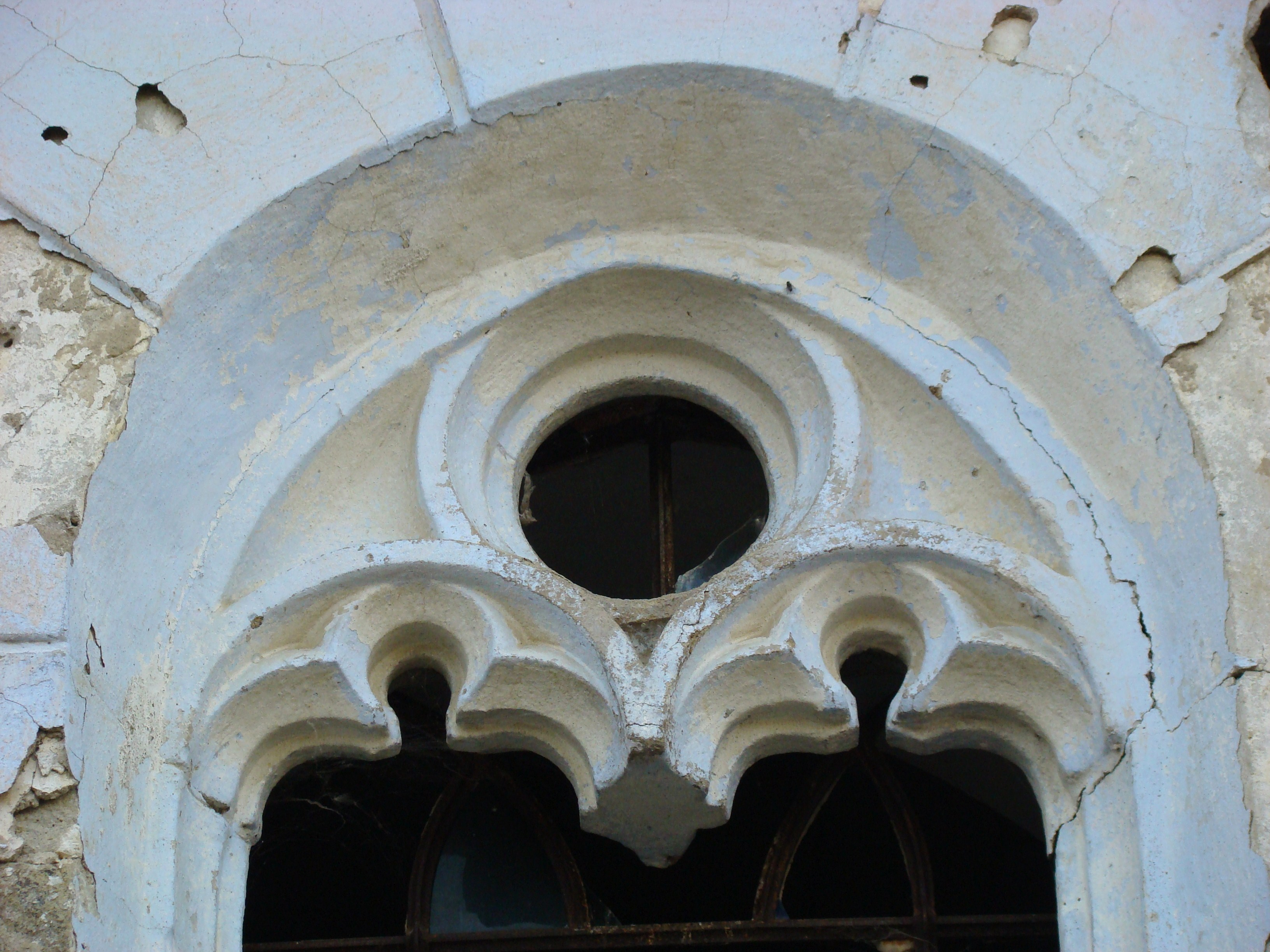 Biserica evanghelică C.A., azi biserica ortodoxă "Sf. Arhg. Mihail si Gavriil", sat CORVINEŞTI; comuna MATEI